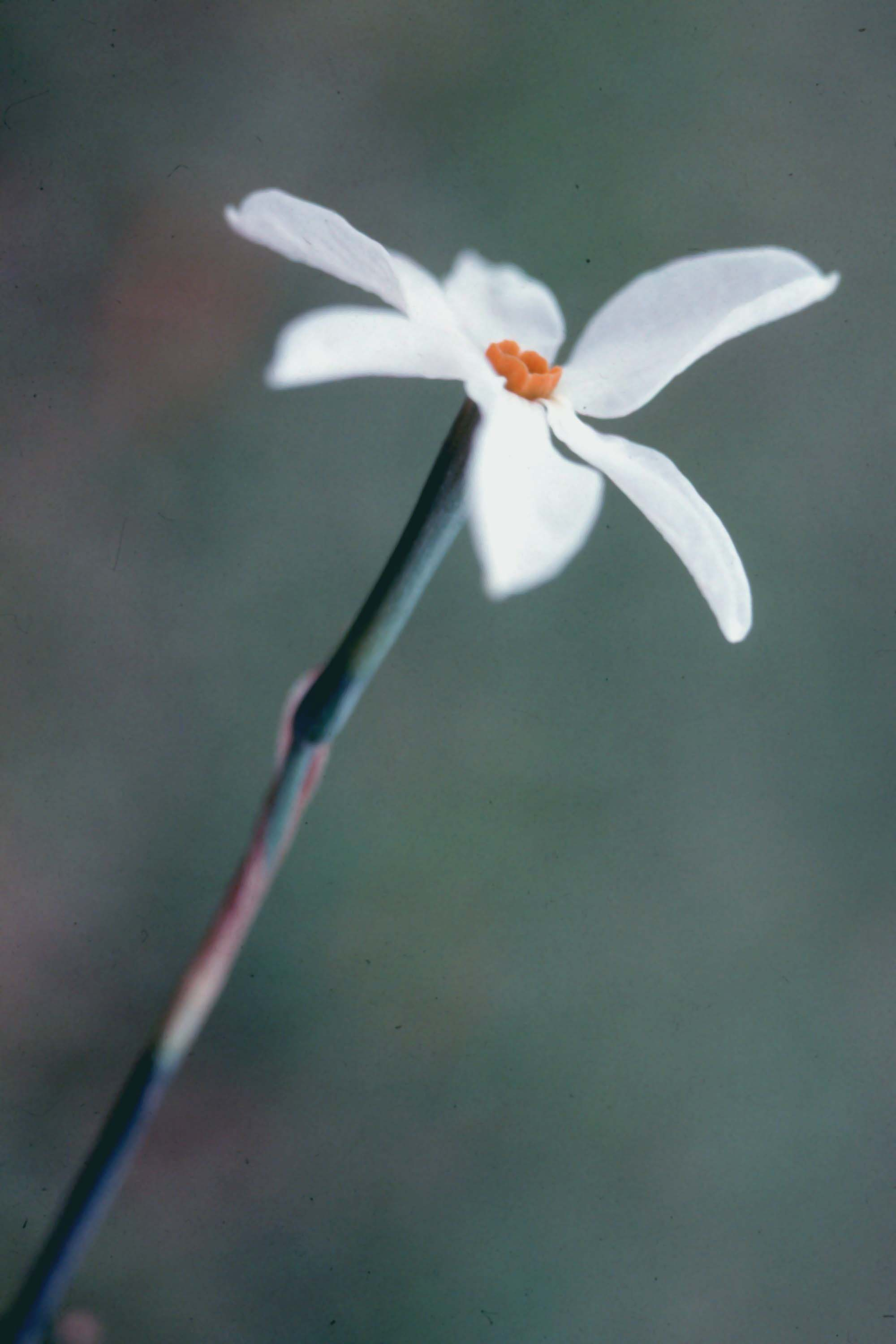 Narcissus serotinus. Doñana, Huelva.